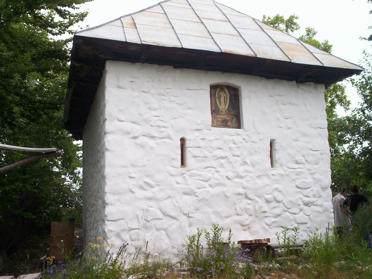 Refacerea bisericii "Sf. Ilie" pe ruinele schitului Cioclovina de Sus, construit în 1714, aparţinând de Mânăstirea Tismana, oraşul Tismana, Gorj